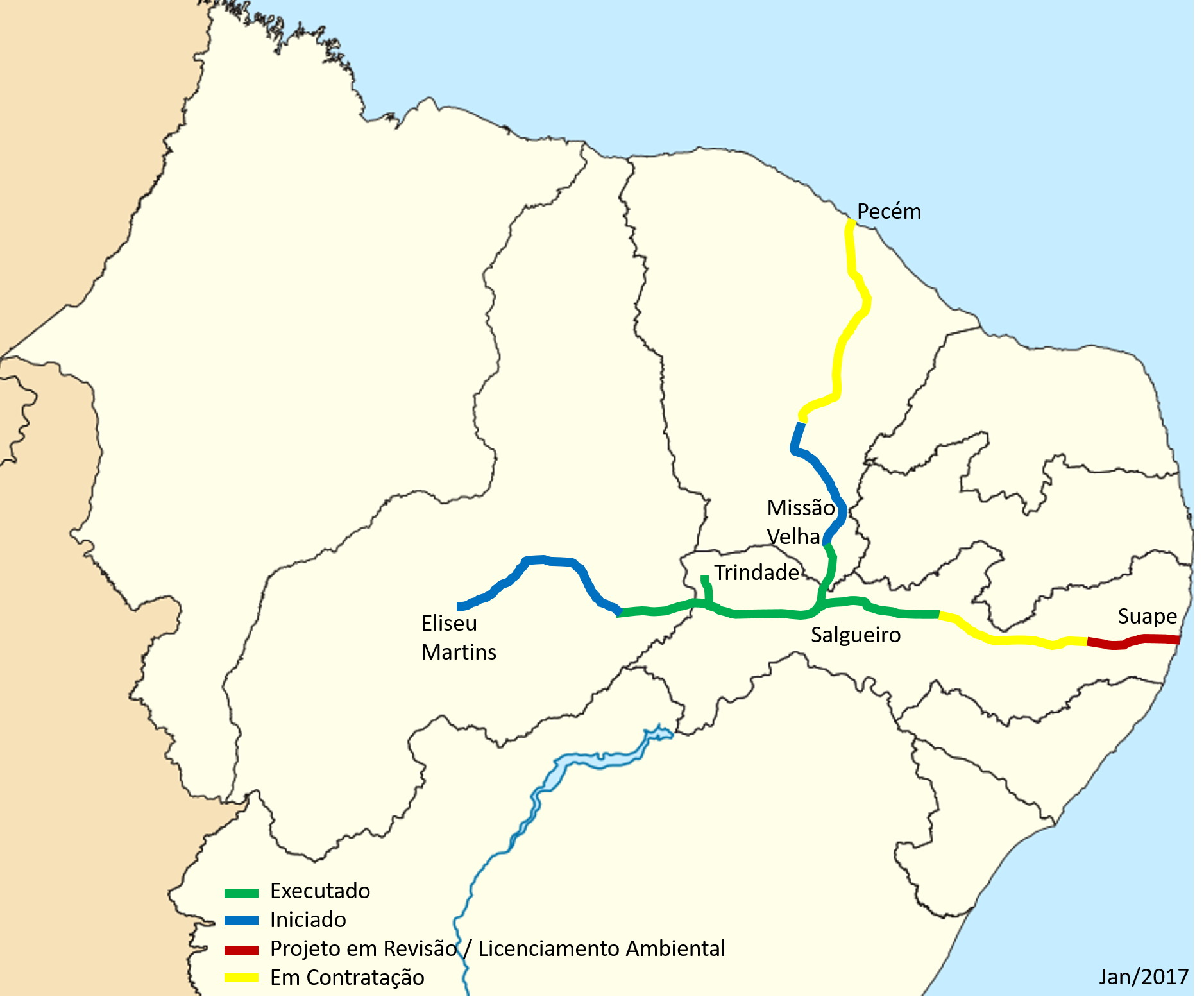 Mapa Transnordestina (TLSA) considerando informações sobre obras de Jan.2017. Fonte G1.